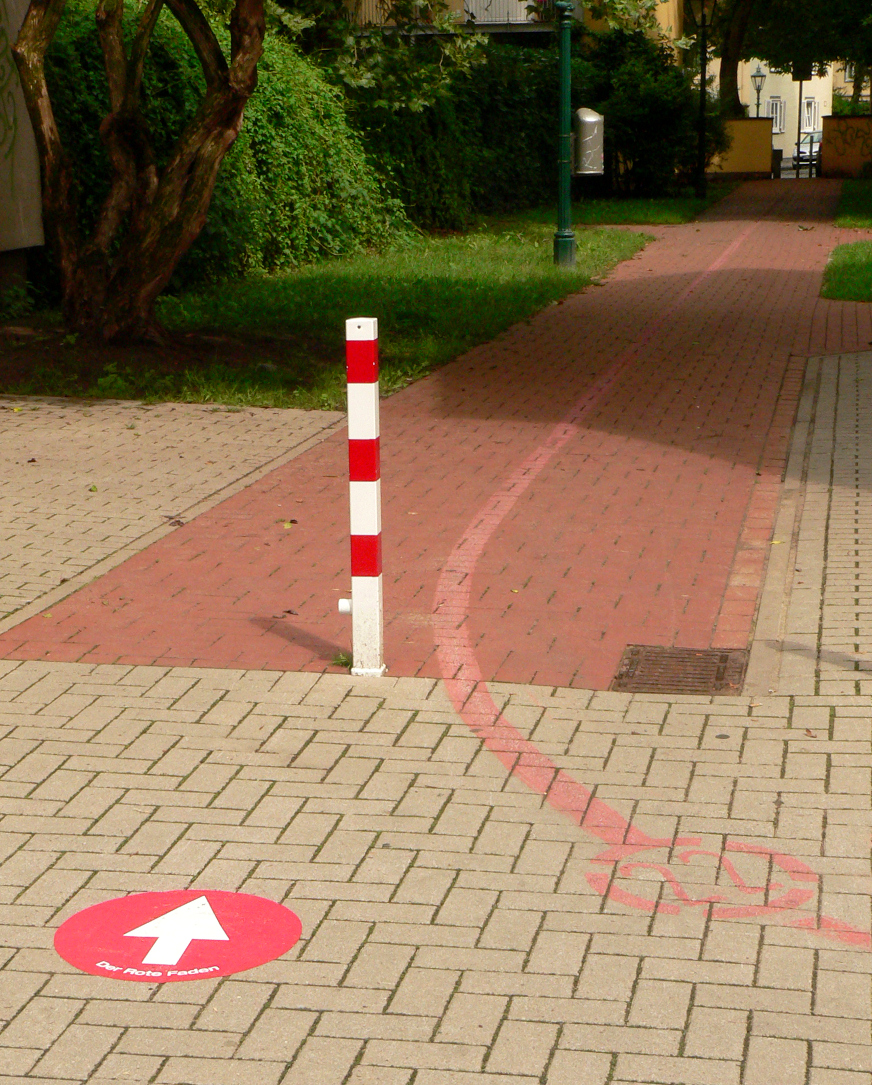 Roter Faden in Hannover mit beschriftetem Aufkleber als Test für einen möglichen Ersatz des auf das Pflaster gemalten roten Strichs